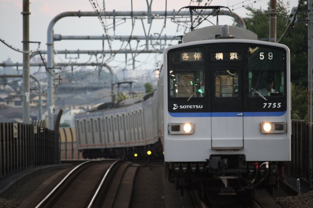 相鉄7000形7755編成 ゆめが丘